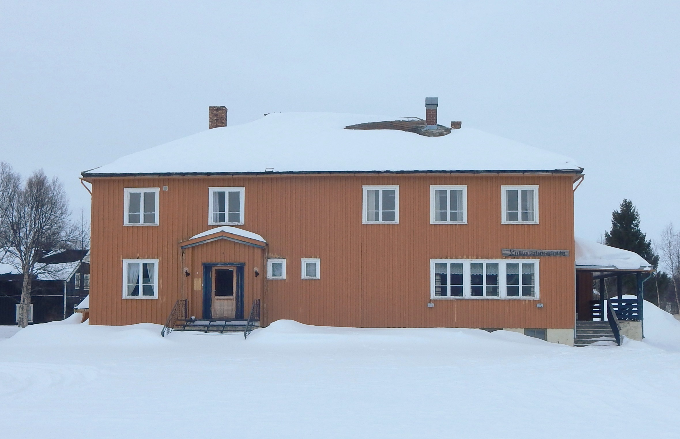 Tidligere Brekken herredshus har hatt variert bruk også etter at Brekken ble innlemmet i Røros, blant annet som tilholdssted for det nå nedlagte historielaget.